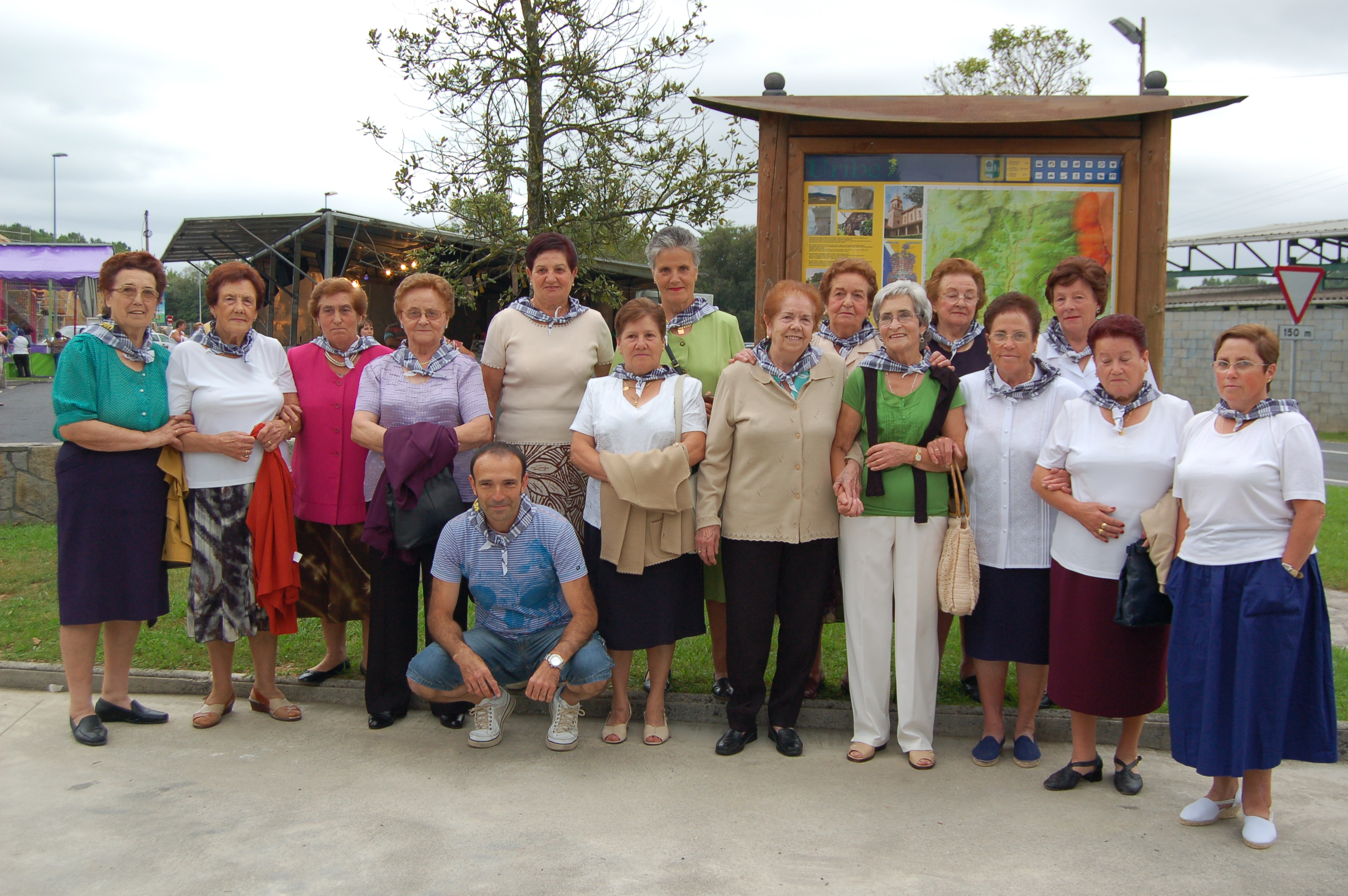 Maruri-Jatabeko 2009ko jaietako omenaldia